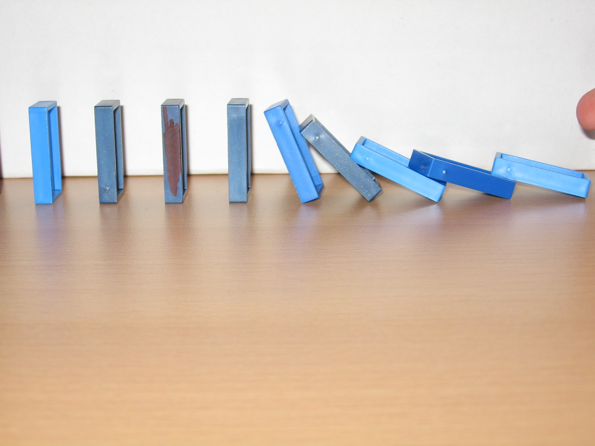 Das Foto zeigt Dominosteine beim umfallen